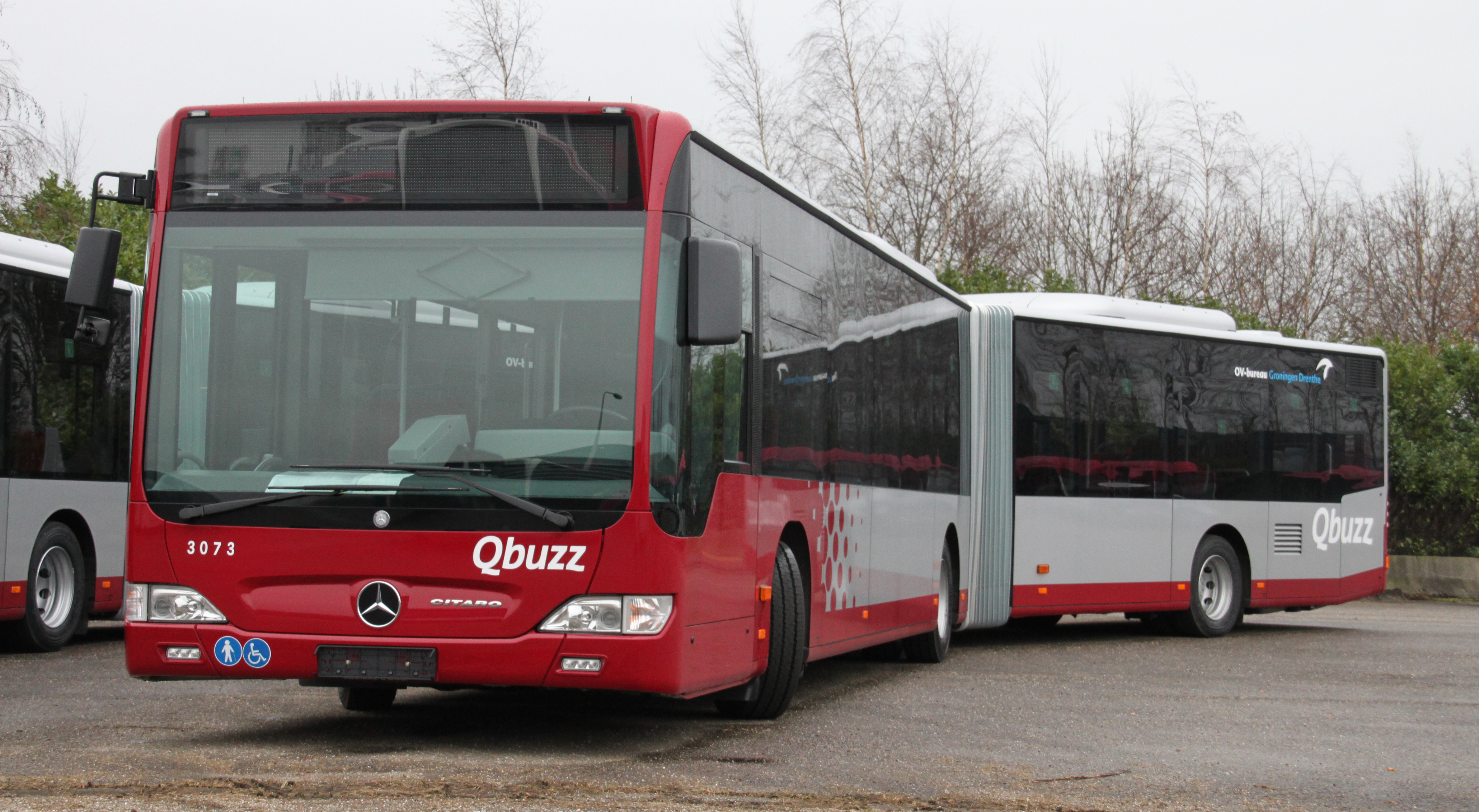 Qbuzz-bus voor het concessiegebied Groningen/Drenthe.